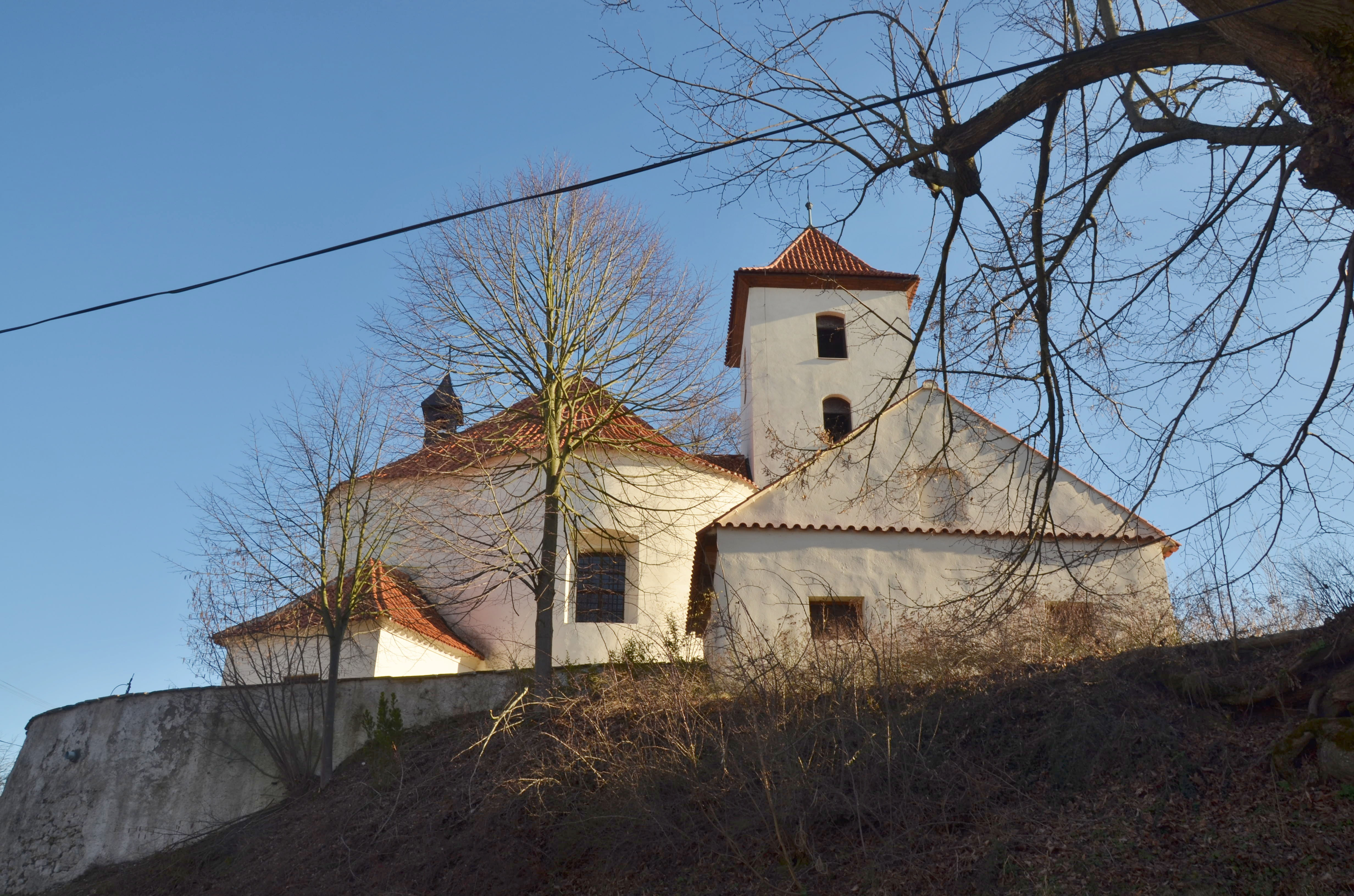 kostel sv. Václava v Libouni